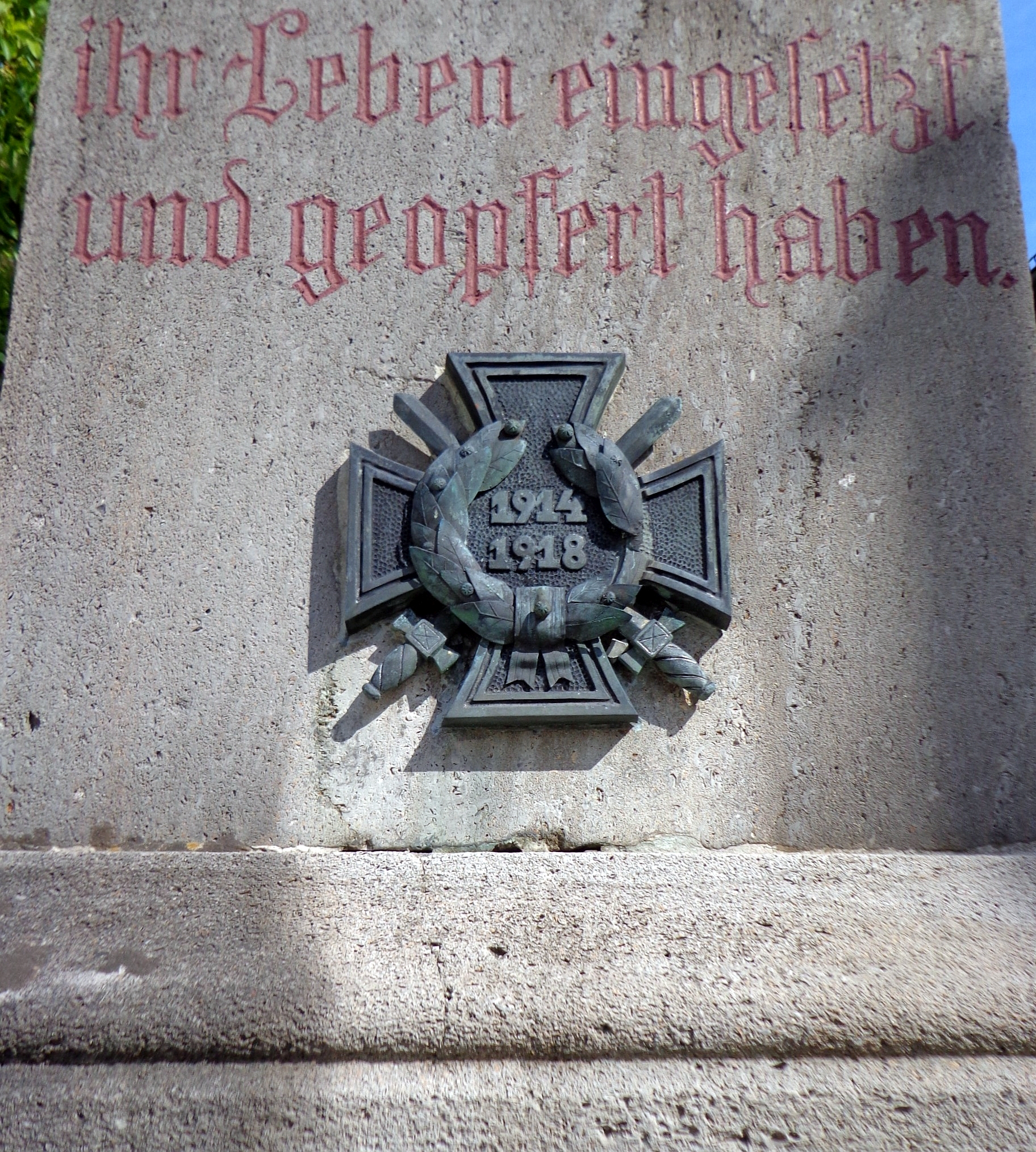 Tettenweis, Landkreis Passau: Darstellung des am 13. Juli 1934 durch den Reichspräsidenten Paul von Hindenburg anlässlich des 20. Jahrestages des Kriegsbeginns 1914 gestifteten "Ehrenkreuzes für Frontkämpfer - mit Schwertern" auf dem Denkmal für die im 1. und 2. Weltkrieg gefallenen Bürger von Tettenweis